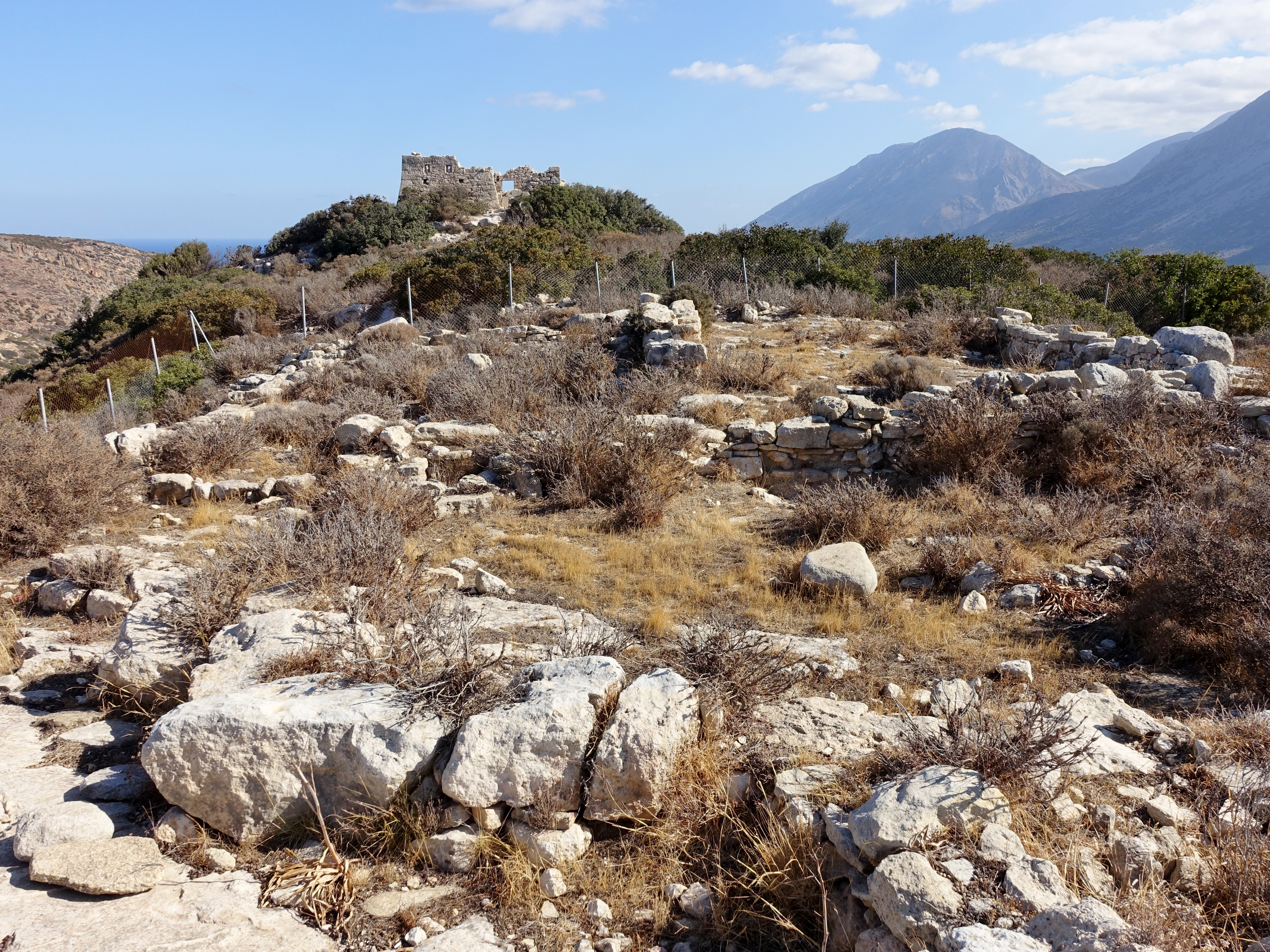 Ausgrabungsstätte von Vassiliki Kephala (Βασιλική Κεφάλα) bei Vasiliki, Gemeinde Ierapetra, Kreta, Griechenland